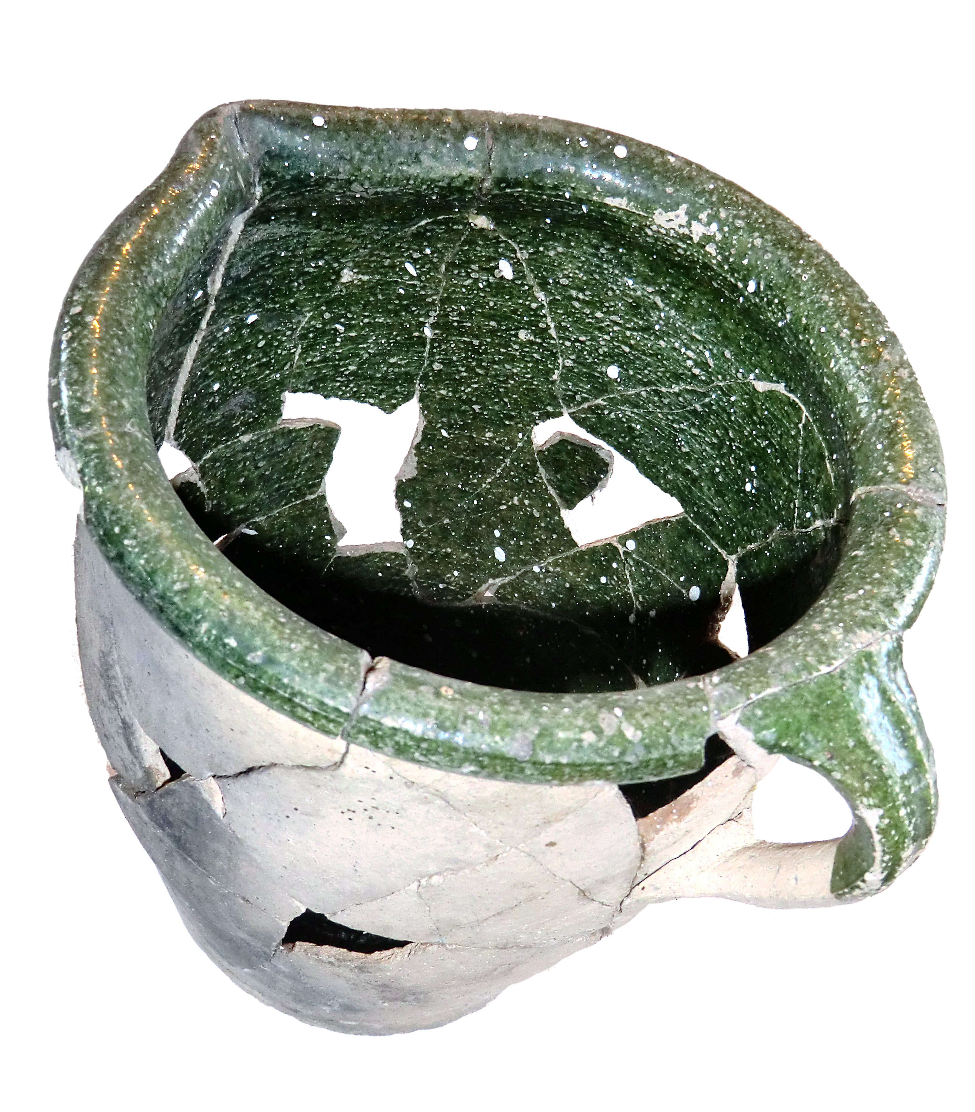 Aus Scherben zusammengesetzter Henkeltopf aus Niederbayern / Rottal. Hafner (Töpfer) aus der Renaissance.